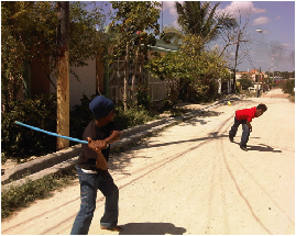 Foto de jovenes jugando vitilla